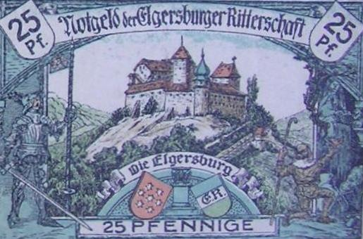 Notgeld der Elgerburger Ritterschaft (25 Pfennig) mit Ansicht der Elgersburg (wohl 1911). Wurde gedruckt zur Restfinanzierung des Carl Eduard-Turms auf der Hohen Warte bei Elgersburg